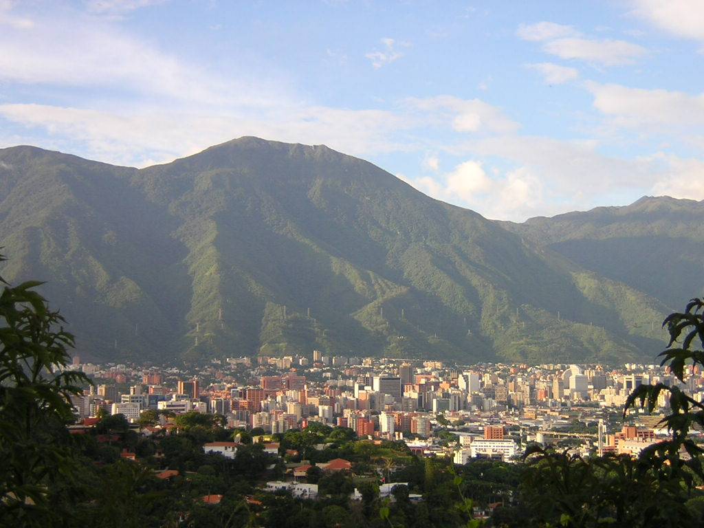 Altamira, La Castellana en Caracas